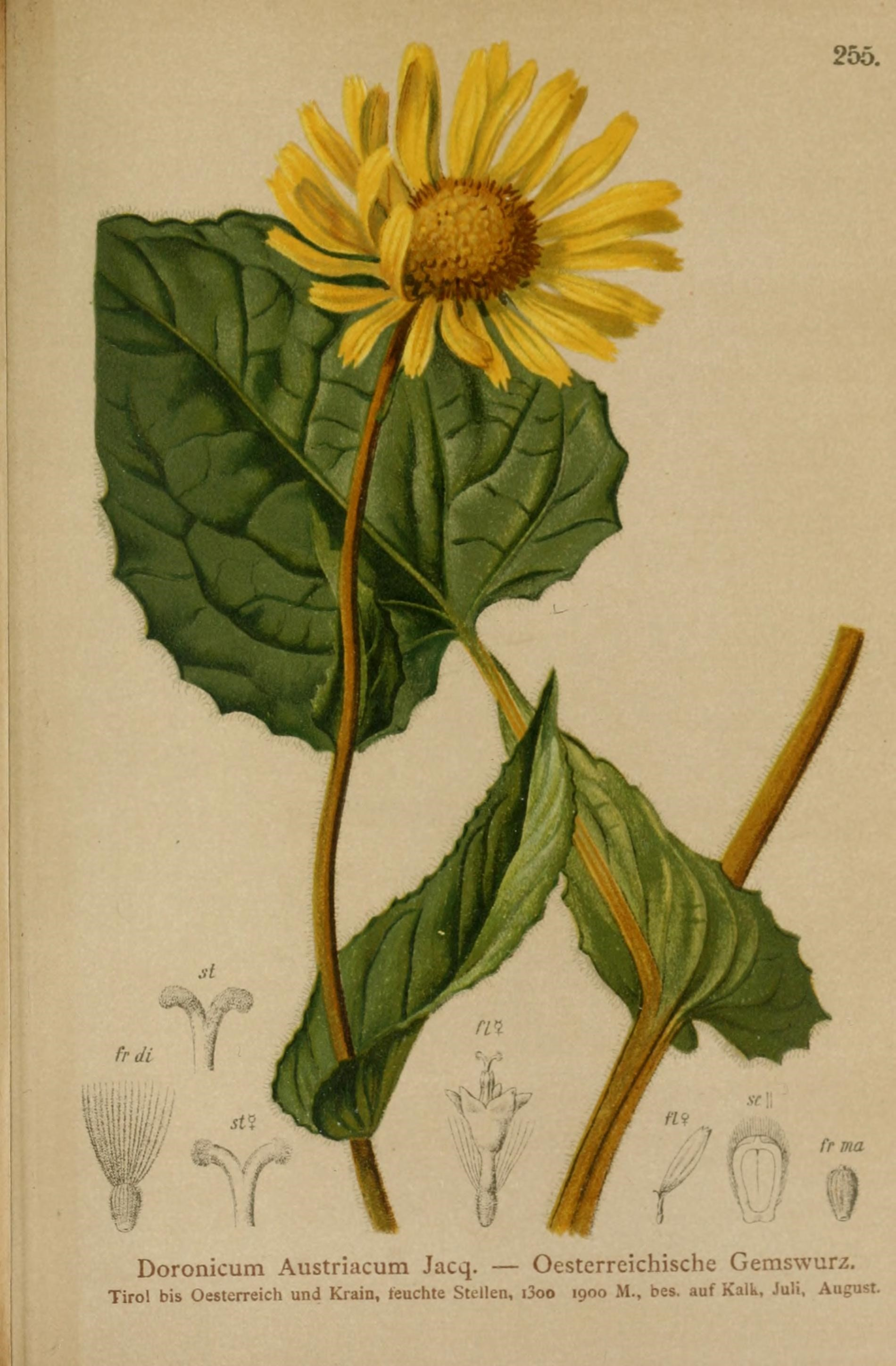 /», y 255. ""0^, rr ma Doronicum Austriacum Jacq. — Oesterreichische Gemswurz. Tirol bis Oesterreich und Krain, teuchte Stellen, i3oo 1900 M., bes. auf Kalk, Juli, August.